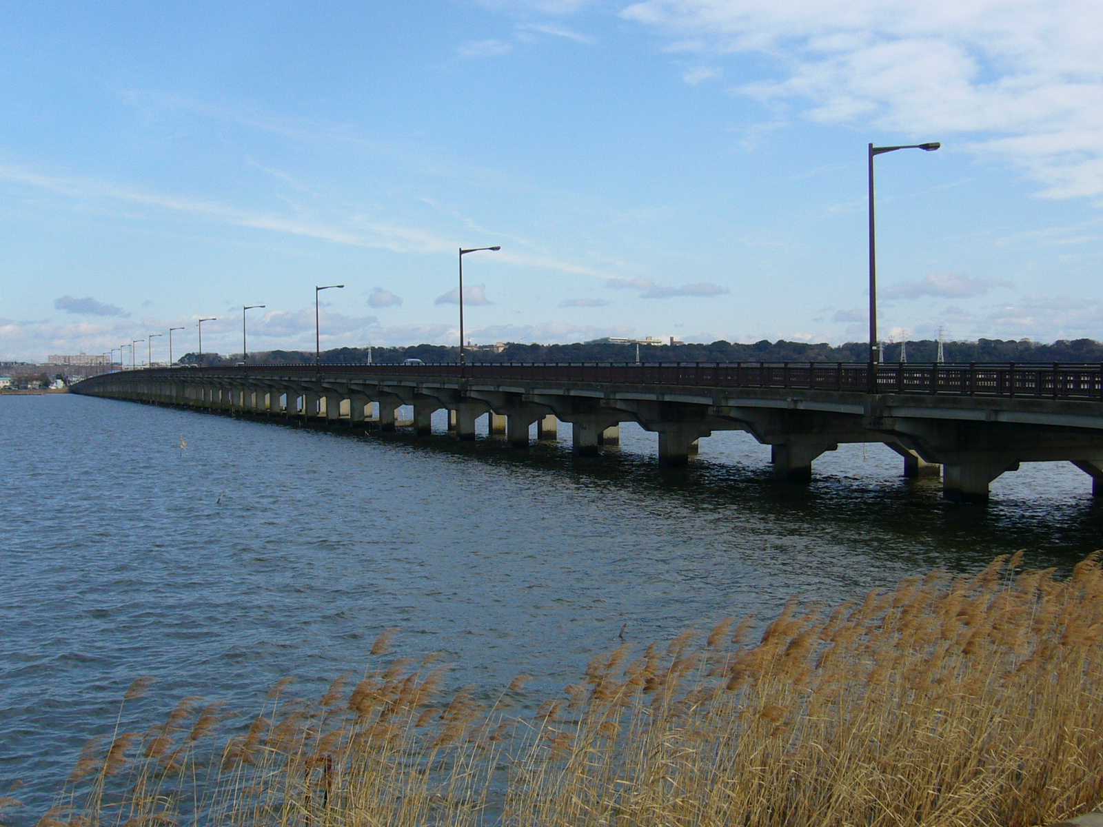 Jingu-bridge-II,jingu-bashi,kashima-city,japan